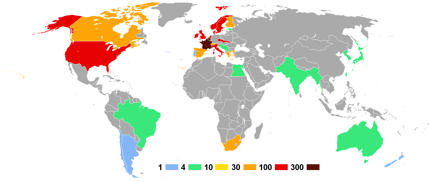 Olympische Sommerspiele 1928 — Anzahl der Athleten